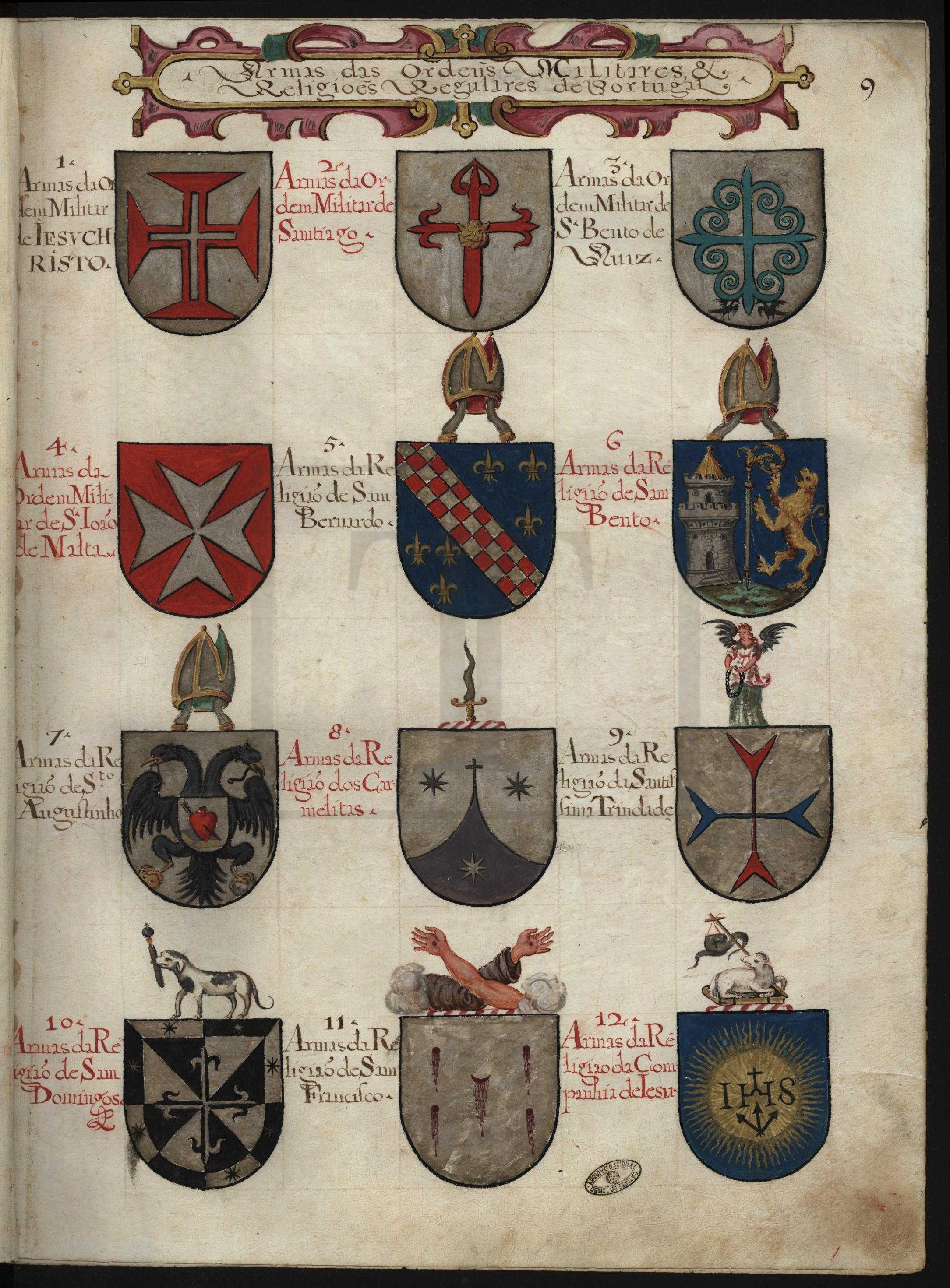 Thesouro de Nobreza, Armas das Ordens Militares e Religiosas (fl 9)